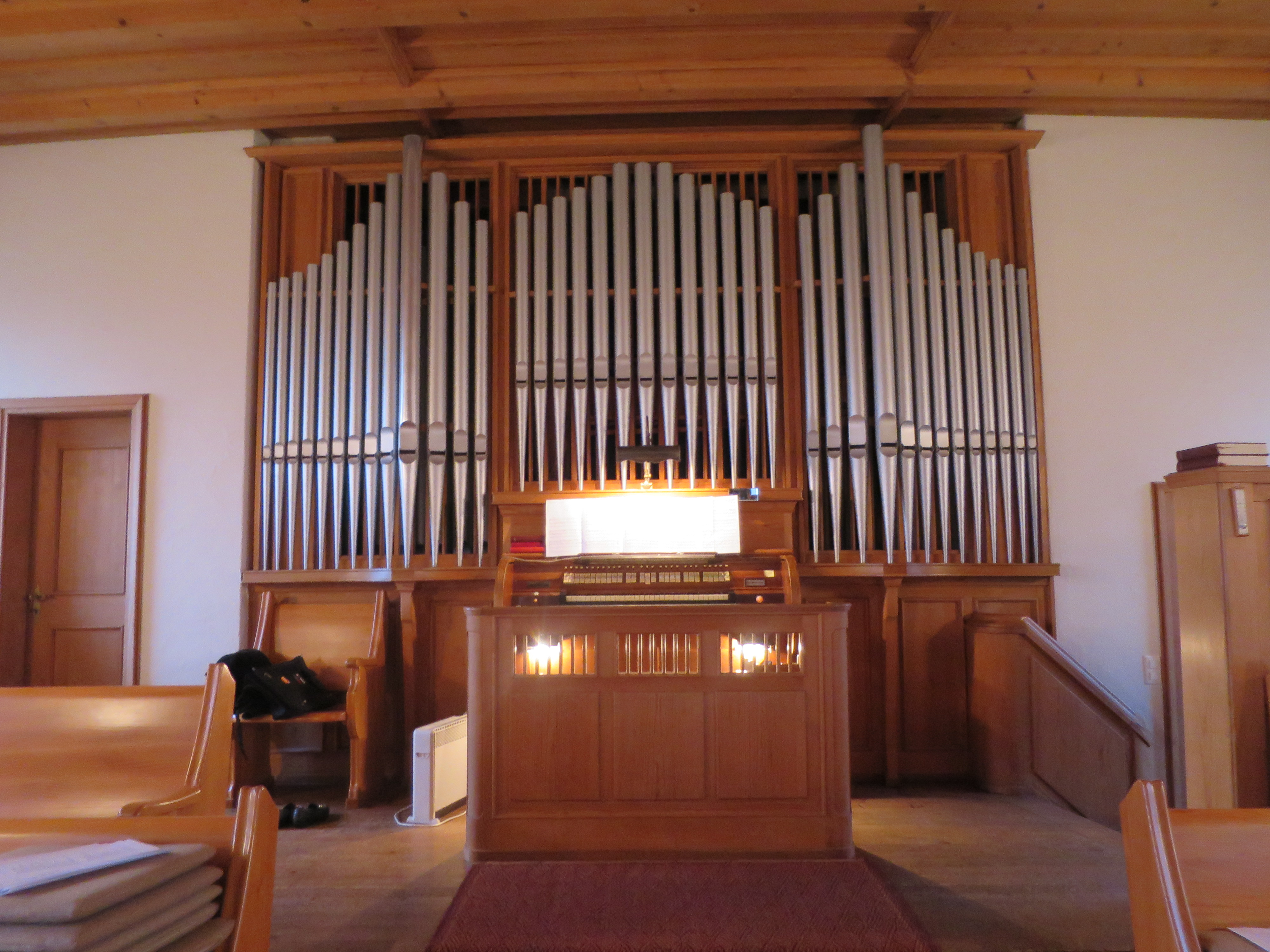 Kirche Steinmaur - Orgel, Kuhn 1928